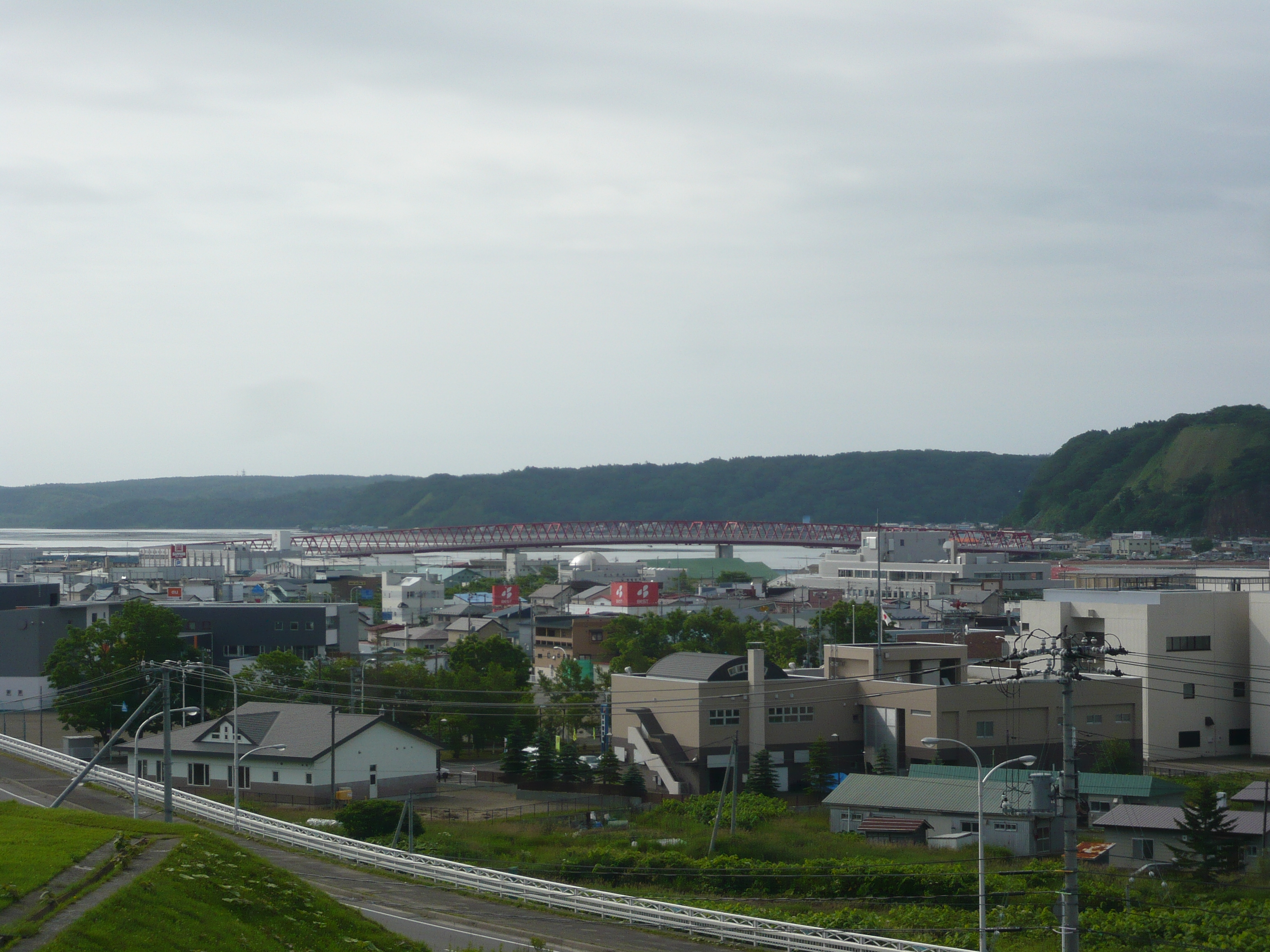 厚岸道の駅より、厚岸町中心部を望む。手前が厚岸湖北岸である